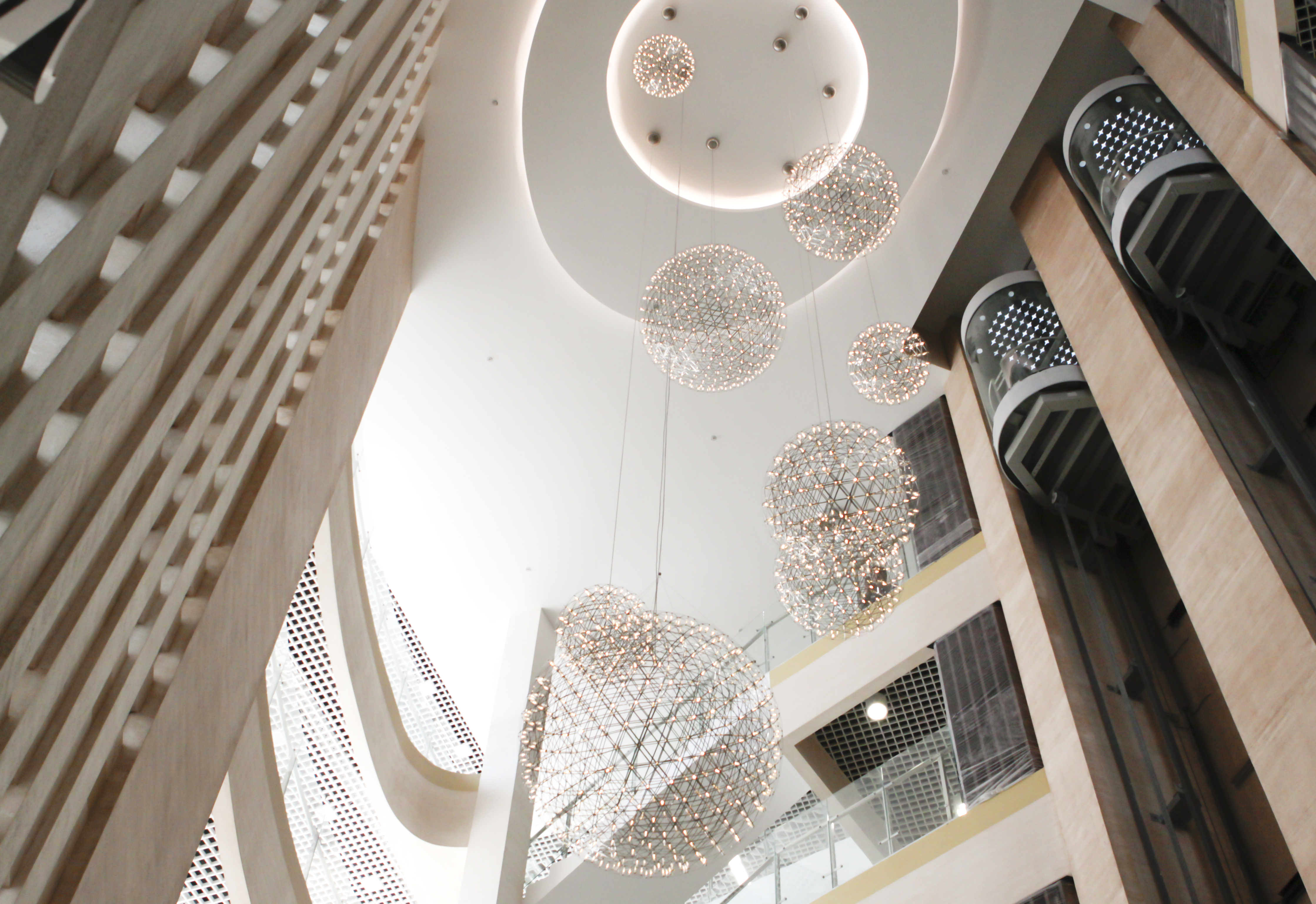 Новый корпус РУК, Мытищах